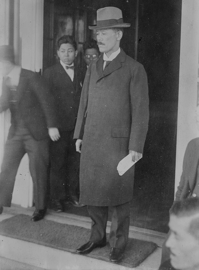 Japanese Prime Ministers Reijirō Wakatsuki